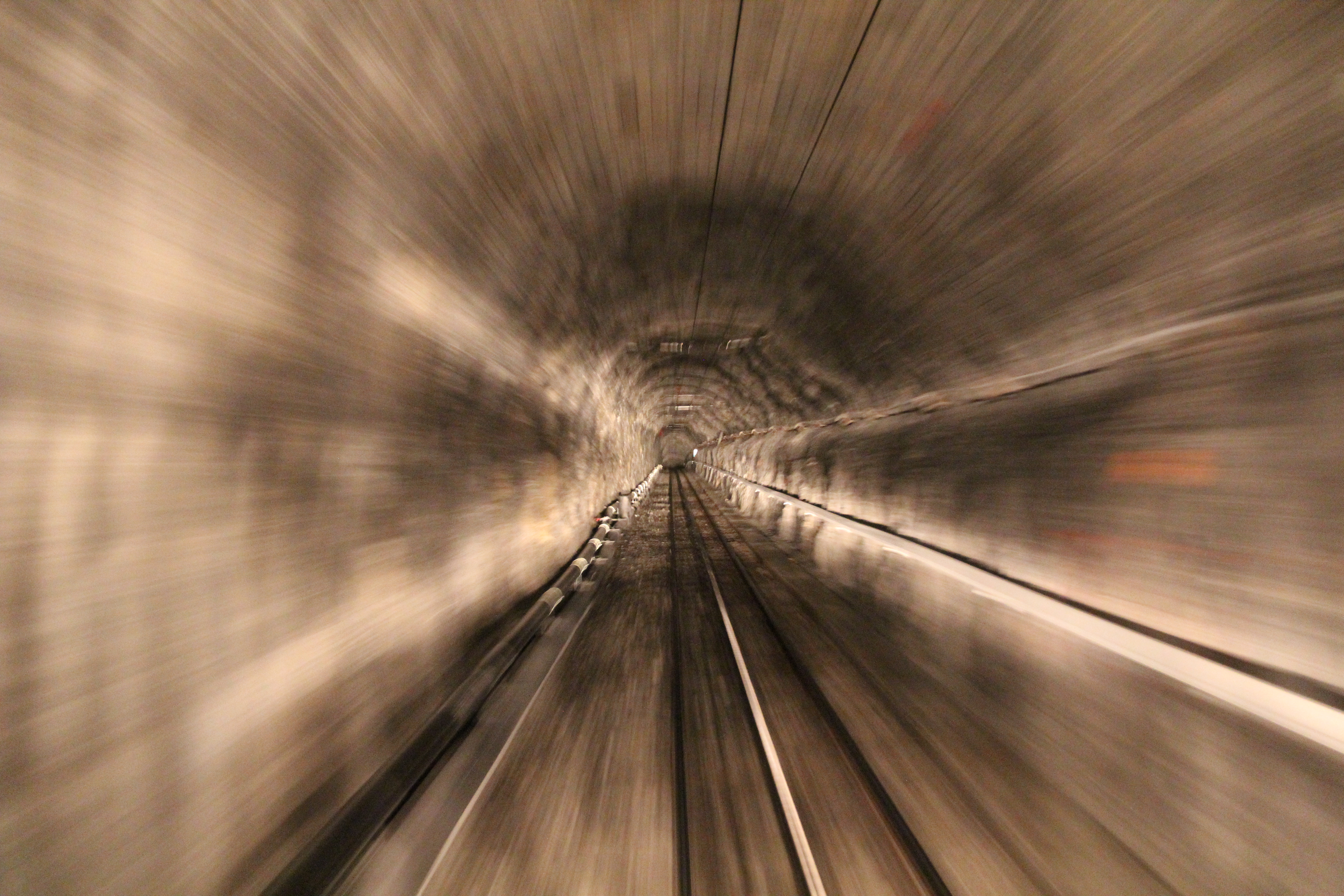 Tunnel der Eigernordwand, Jungfraubahn, Berner Oberland